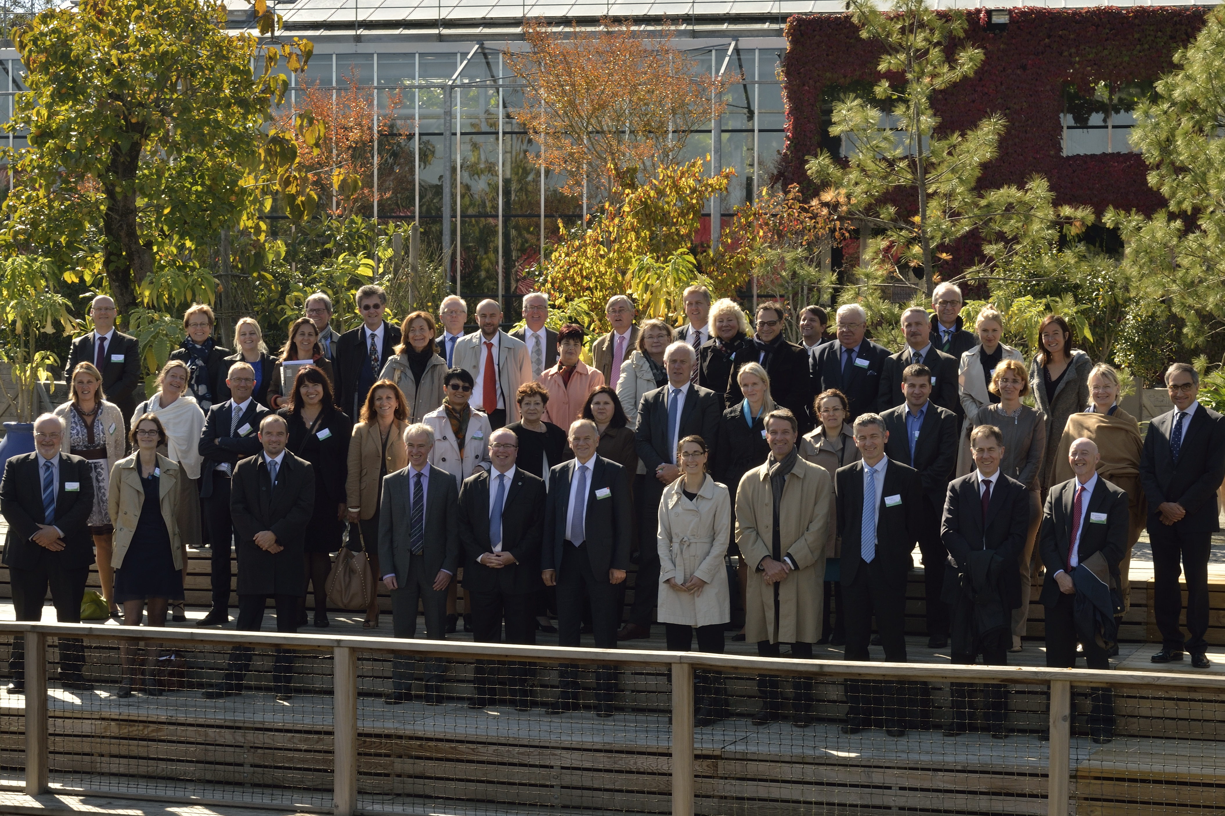 Membres du Conseil d'Administration de l'OCVV